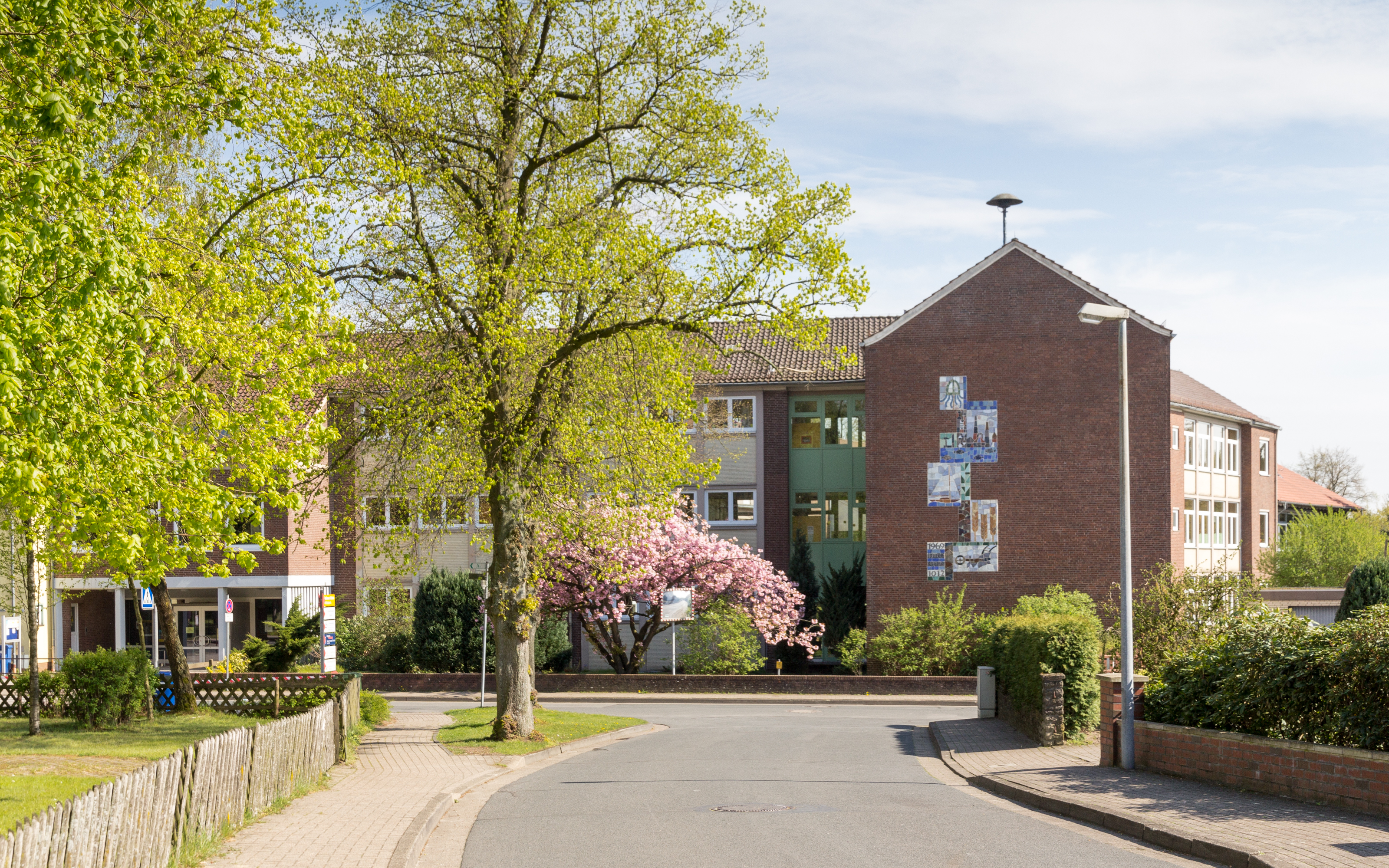 Grundschule Baden (ehem. Volksschule Baden), Holzbaden, 28832 Achim